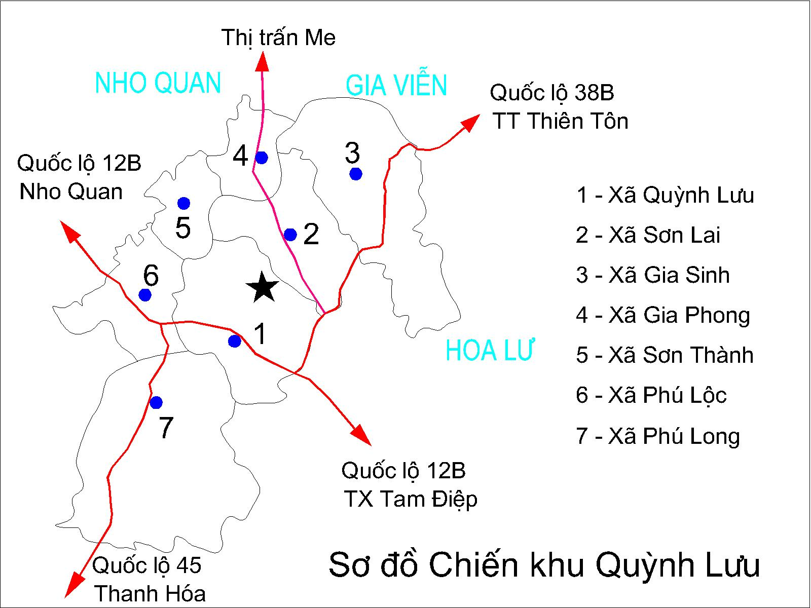 Sơ đồ chiến khu Quỳnh Lưu, Nho Quan & Gia Viễn - Ninh Bình